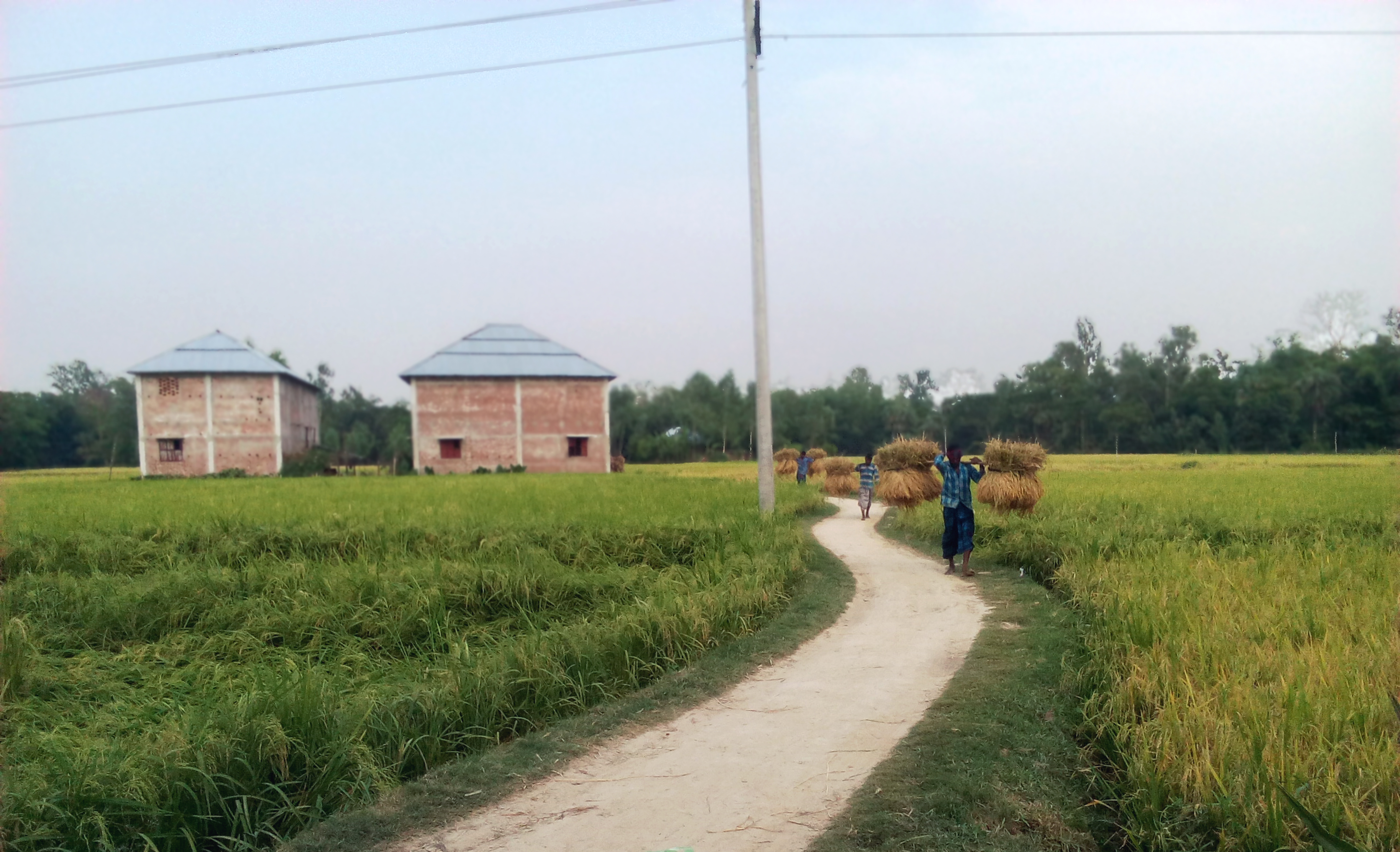 পাকা ধান ঘরে তুলতে ব্যস্ত কৃষক। বাংলাদেশের বগুড়া জেলার দুপচাঁচিয়া উপজেলার পাওগাছা গ্রামে তোলা ছবি।